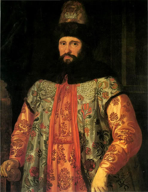 The ambassador Ivan Chemodanov Justus Suttermans L’Ambasciatore Ivan Chemodanov 1657 ca. olio su tela, cm 148x125,5 Firenze, Palazzo Pitti, Galleria Palatina